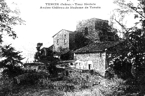 Château de Claudine Guérin de Tencin, Tencin, Isère, France.